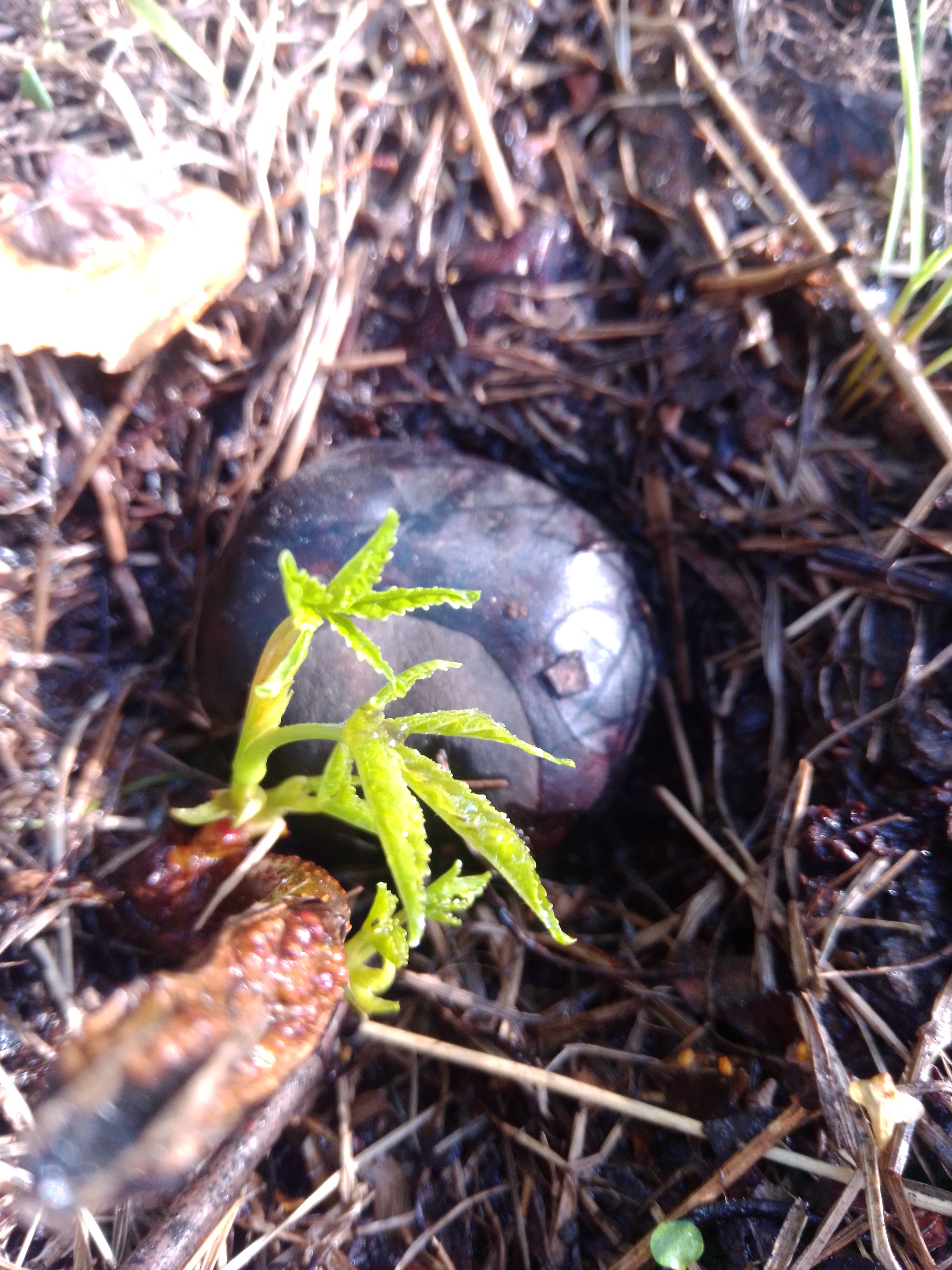 Побеги конского каштана после его обламывания